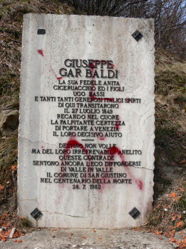 Cippo Garibaldi Bocca Trabaria ombrie Italie